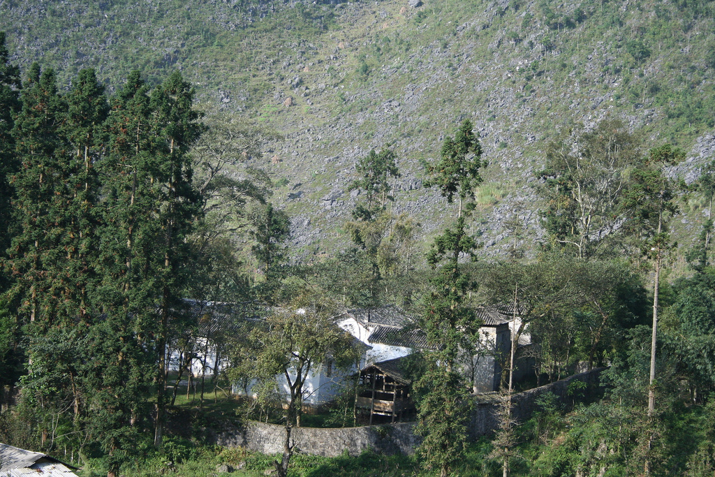 Dinh cơ vua Mèo (Đồng Văn, Hà Giang) nhìn từ trên cao.